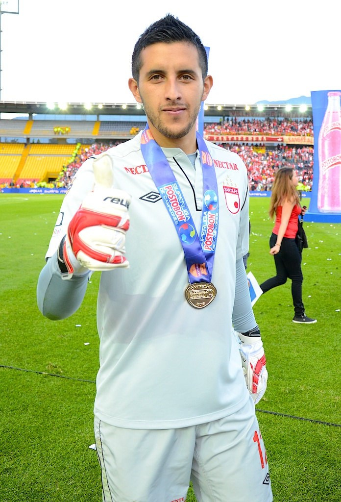 Con la medalla de campeón de la Superliga Postobon de Campeones 2013